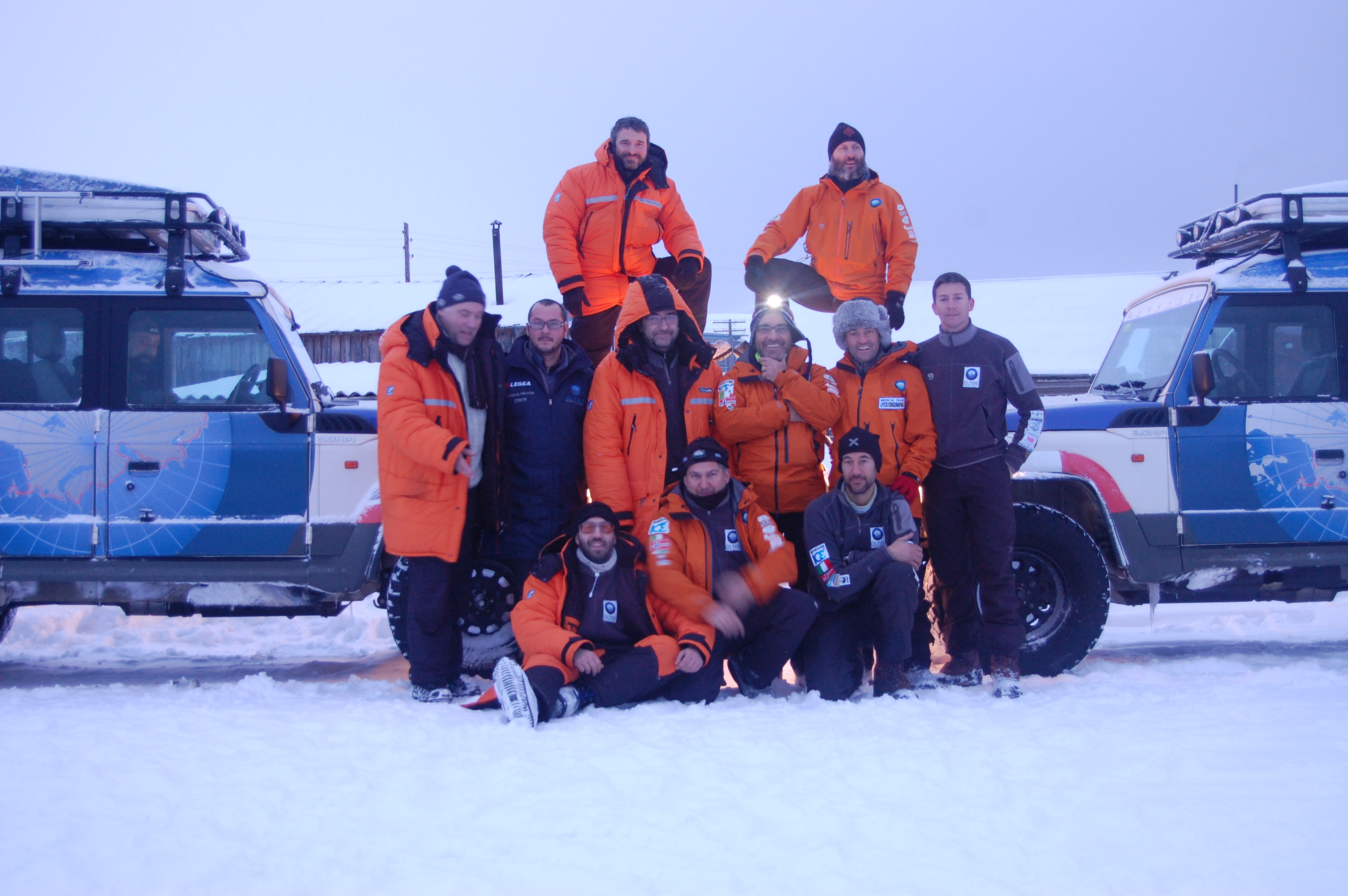 equipaggio prima della partenza